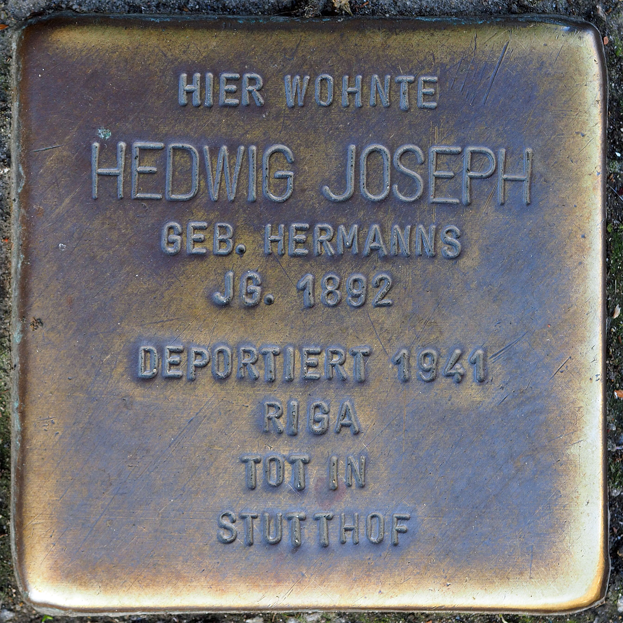 Stolpersteine MG: Joseph, Hedwig